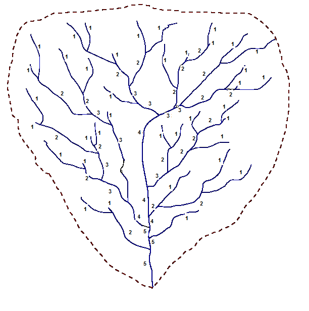 Orden de los rios de una cuenca hidrográfica